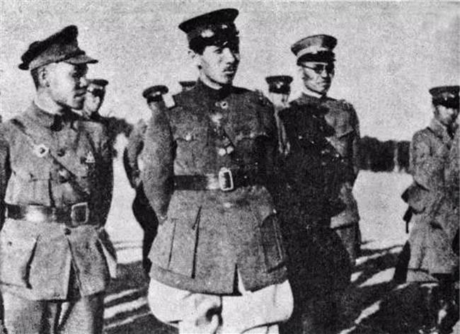 張学良と部下。